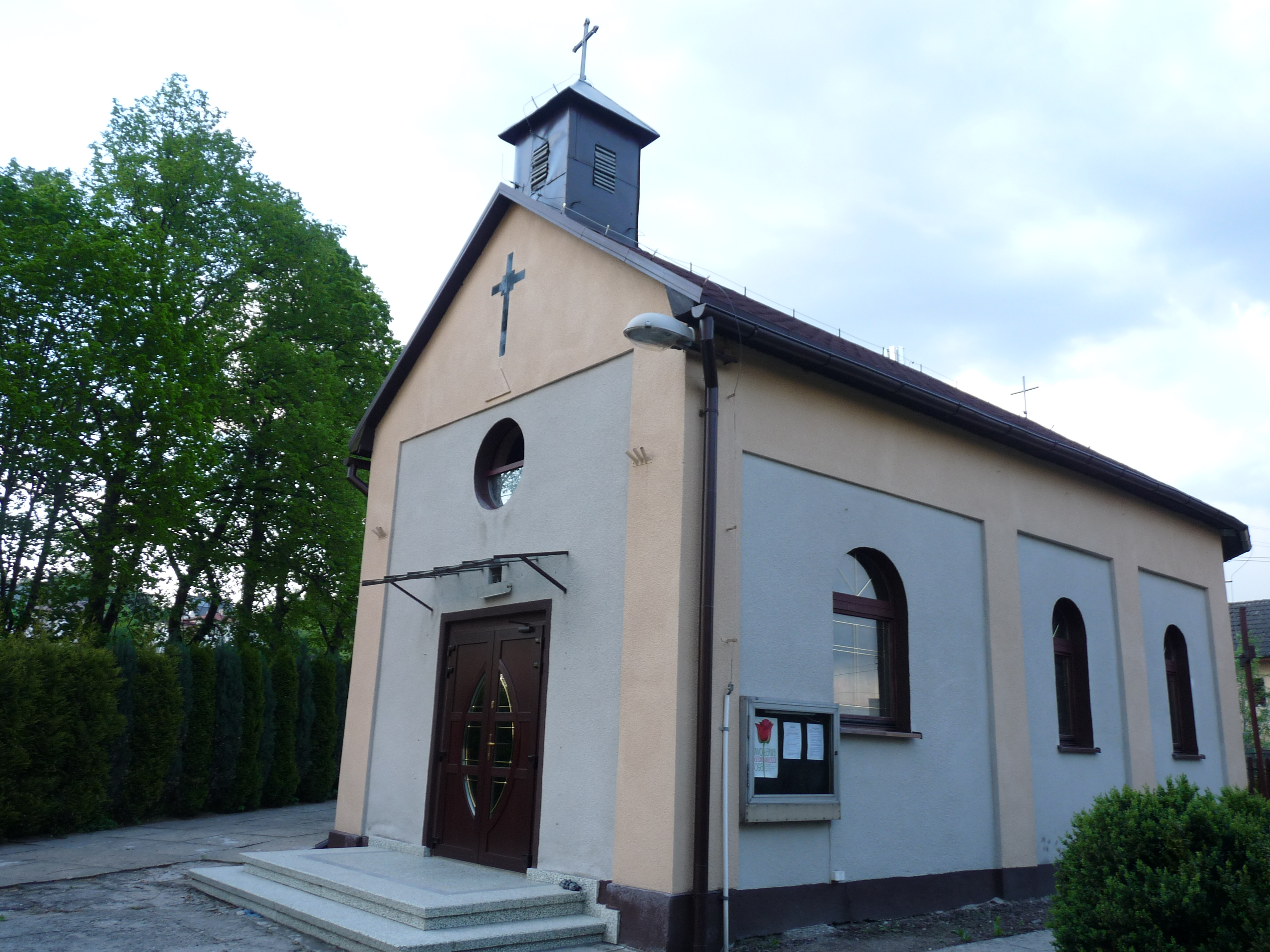 Usytuowana w centrum Skrbeńska w sąsiedztwie Szkoły Podstawowej